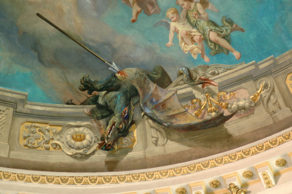 Drago in Basilica